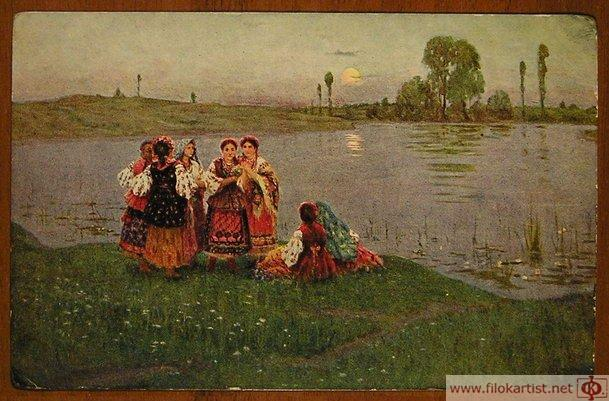 Дряпаченко Иван Кириллович. Сумерки. Издание Любанского О-ва попечения о бедных